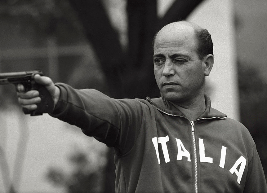 Ugo Amicosante, 1964 Olympics